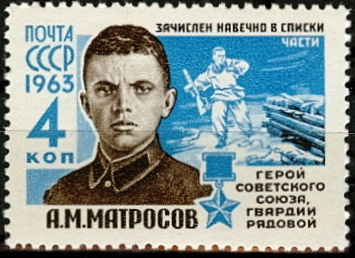 Почтовая марка СССР - Матросов Александр Матвеевич, Герой Советского Союза